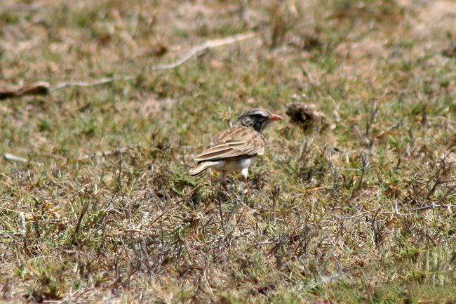 Alouette malgache